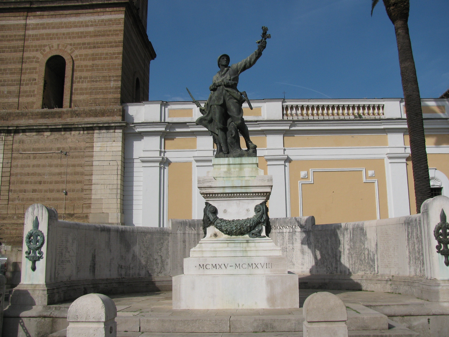 Monumento patriottico commissionato dal Comune di Santa Maria C.V. al prof. architetto Manfredo Manfredi in onore e memoria caduti della prima guerra mondiale